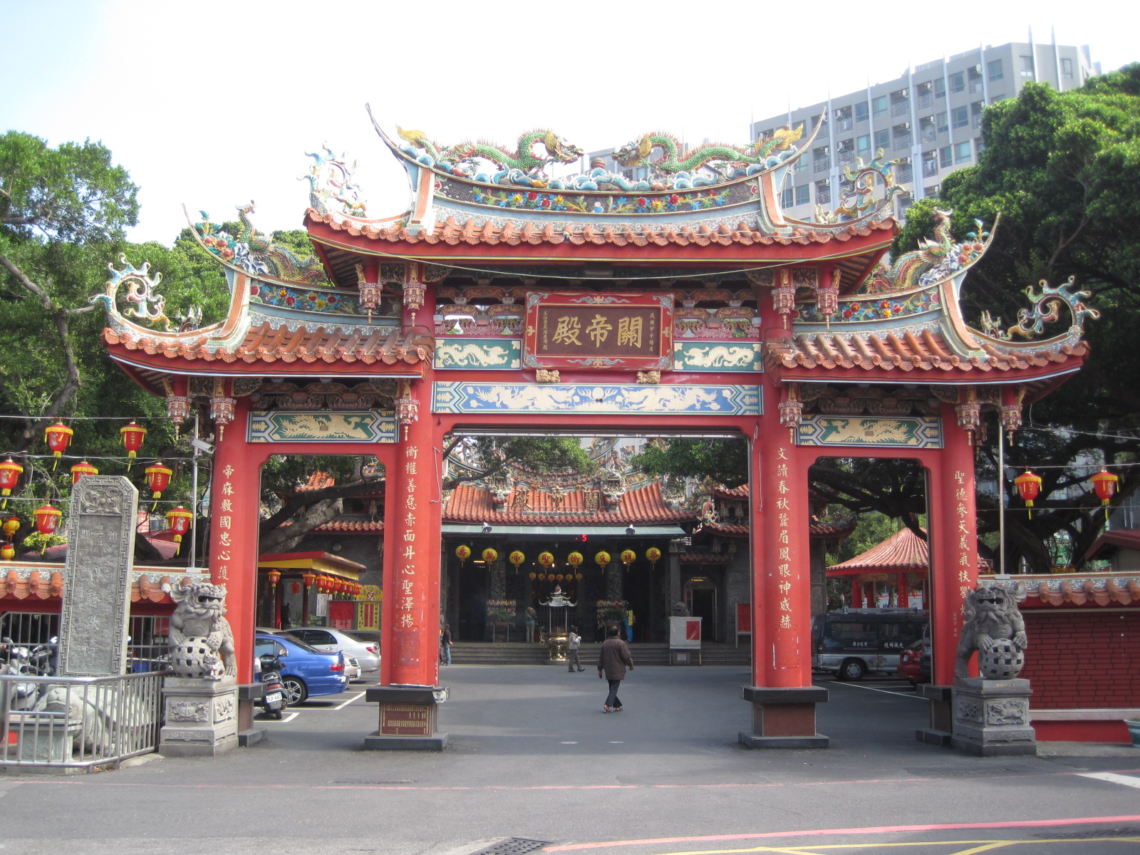 後甲關帝殿牌樓